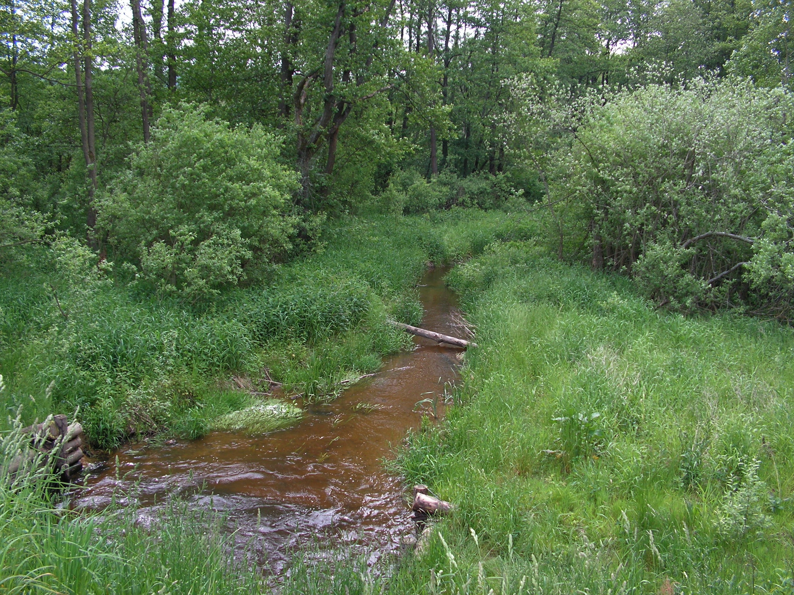 Chobotovský potok pod rybníkem Velká Kamenice